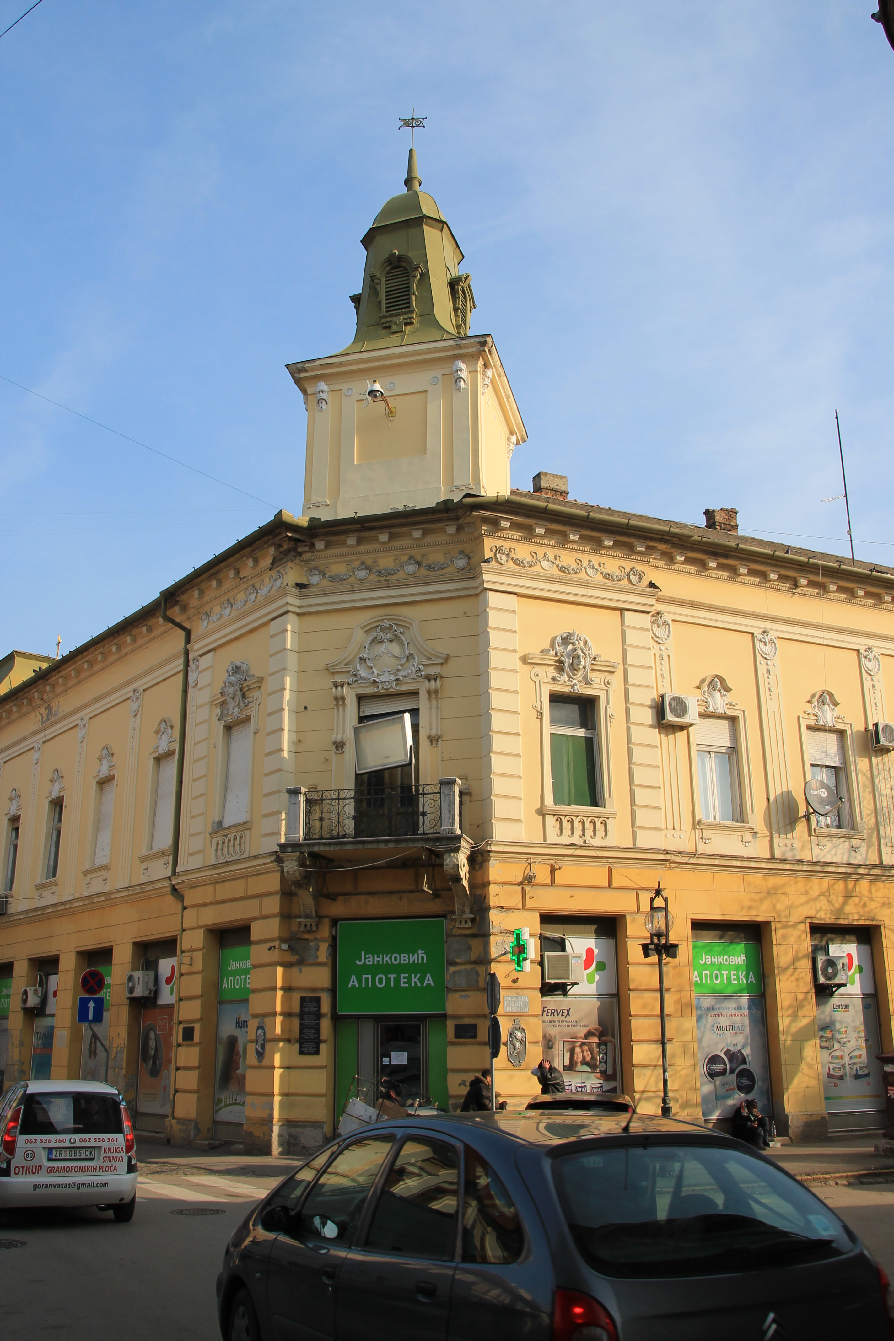 Staro jezgro Zrenjanina